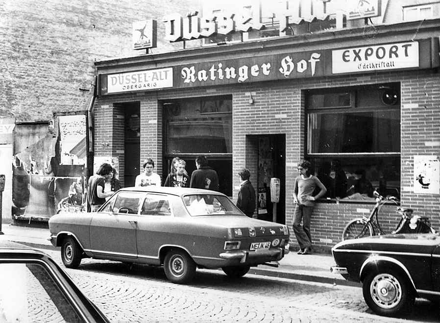 Ratinger Hof in Düsseldorf, legendäre Punkrock Kneipe